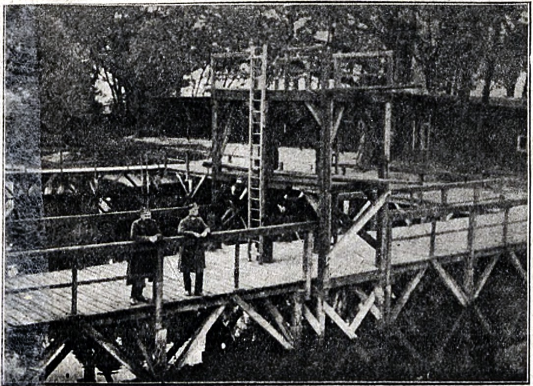 Basen wojskowy w Toruniu na terenie dzisiejszego kempingu w okresie międzywojennym. Zdjęcie z prasy z 1923 roku